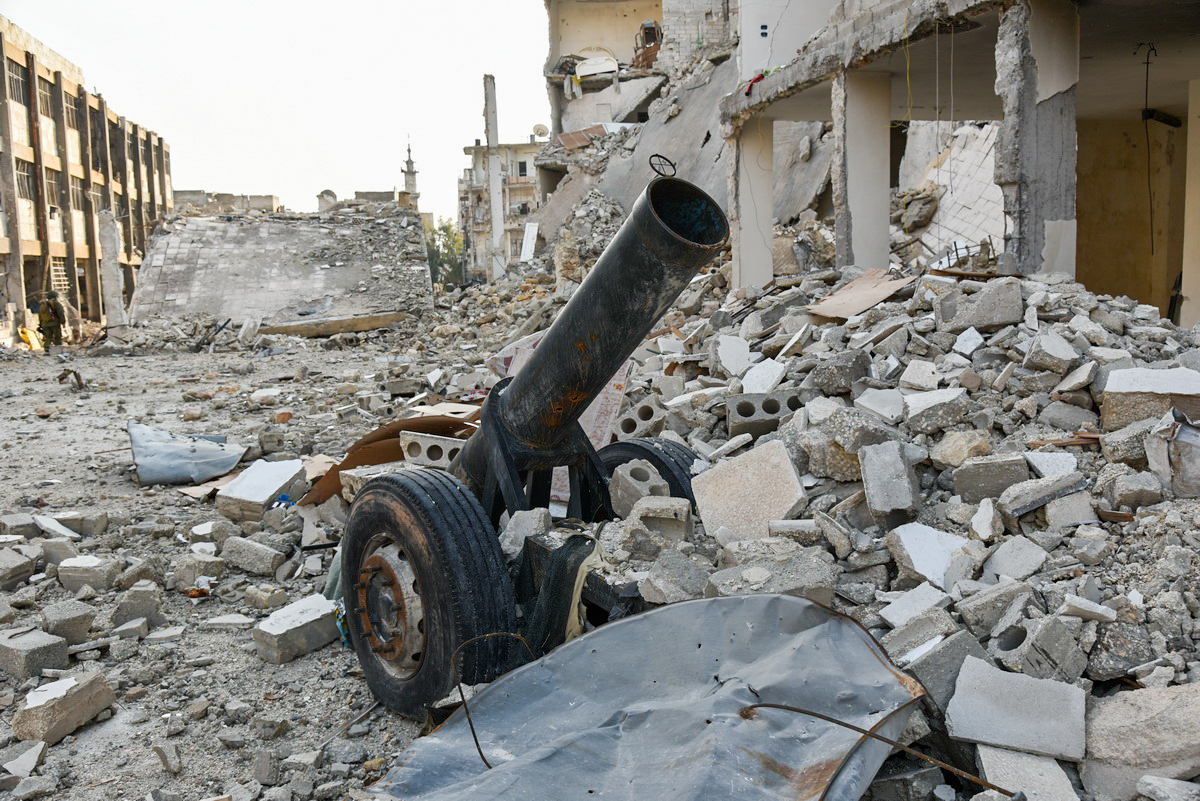 Работа сапёров Международного противоминного центра Министерства обороны России в Алеппо (Сирия)